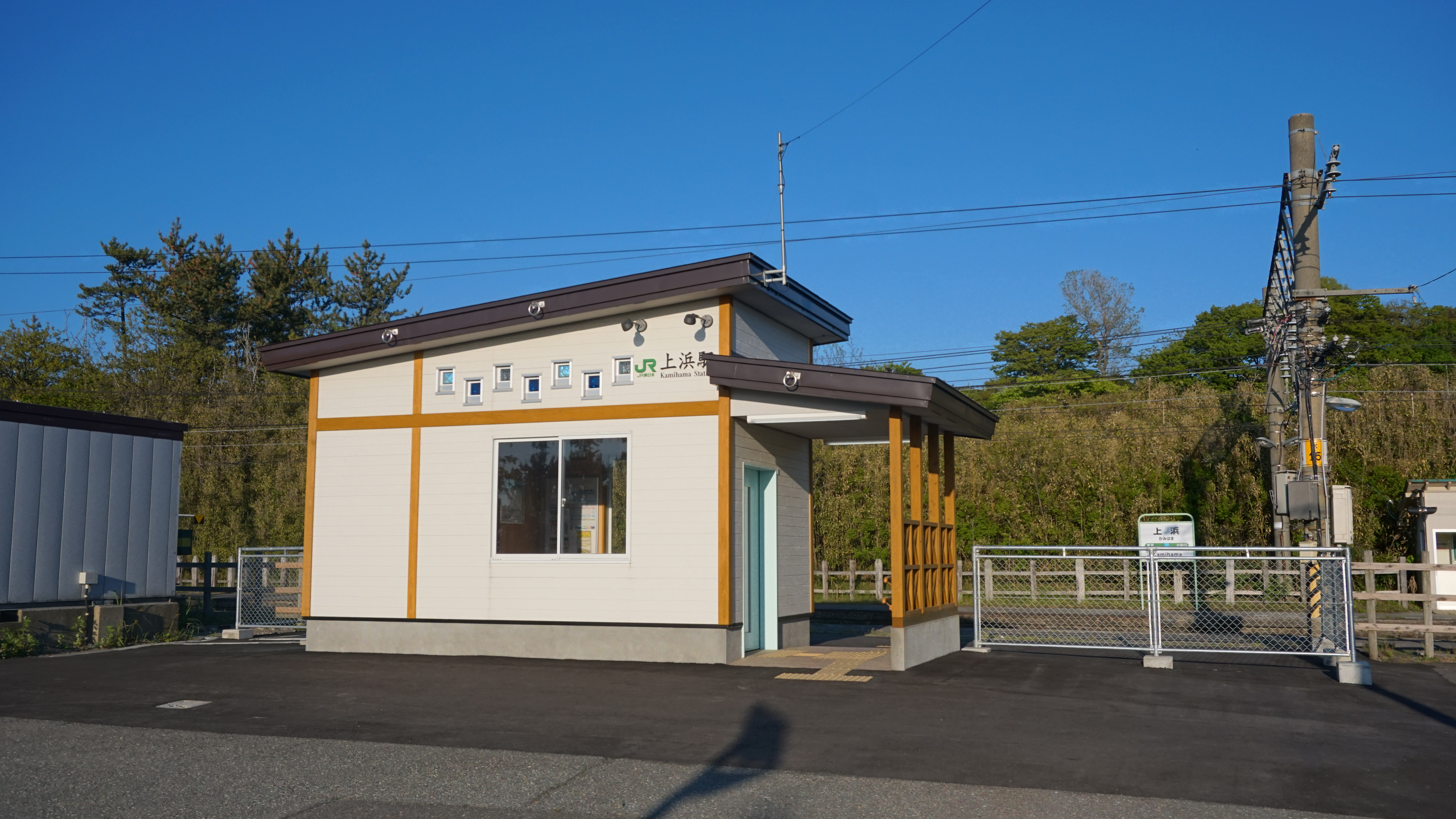 羽越本線 上浜駅(秋田県にかほ市)